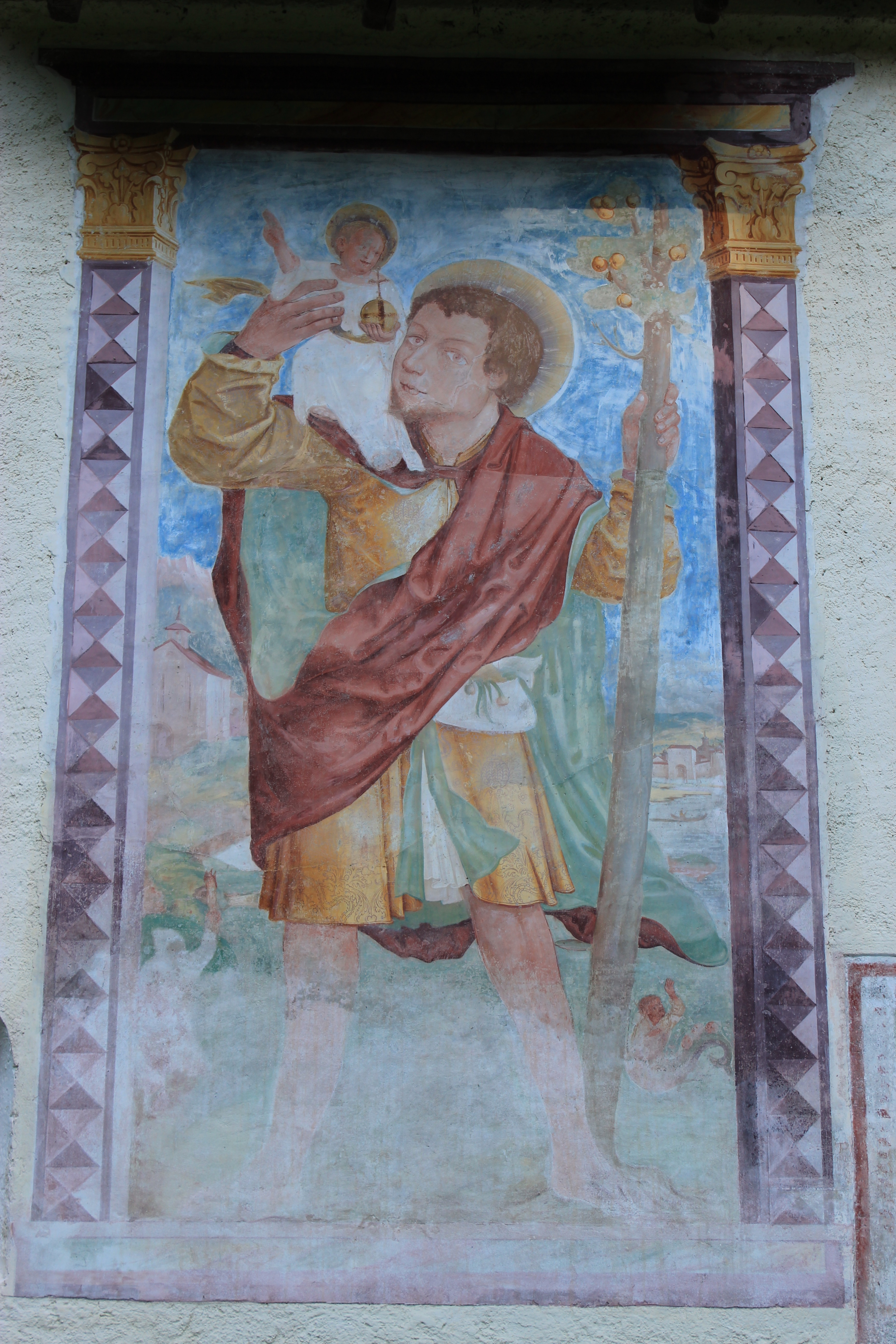 detail